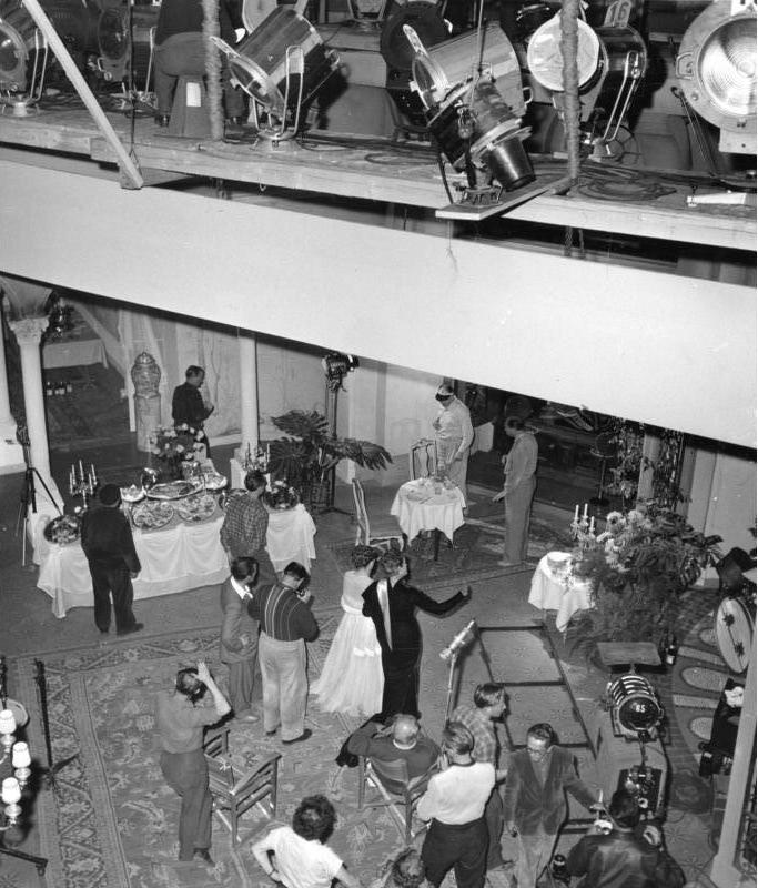 Aufnahme von der Dreharbeit des Films "Alles für Papa" Regie Karl Hartl, der in den Göttinger Filmateliers im Oktober bis Dezember 1953 entstand. Blick von der Beleuchtungsbrücke. Kurz vor der Aufnahme.